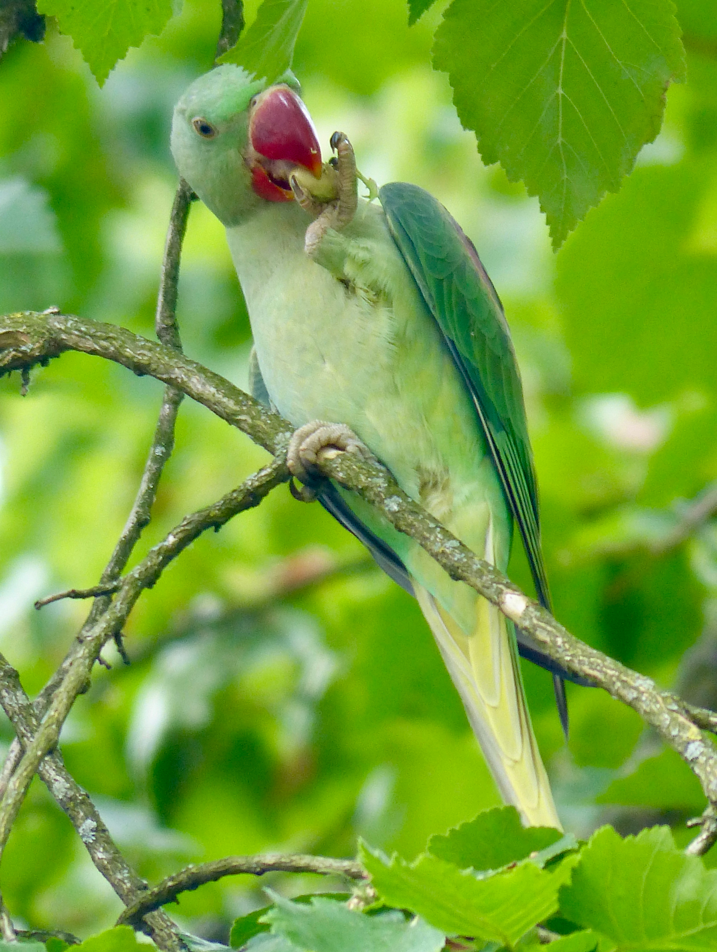 Riehler Heimstätten (2017): Alexandersittich auf dem Schlafbaum